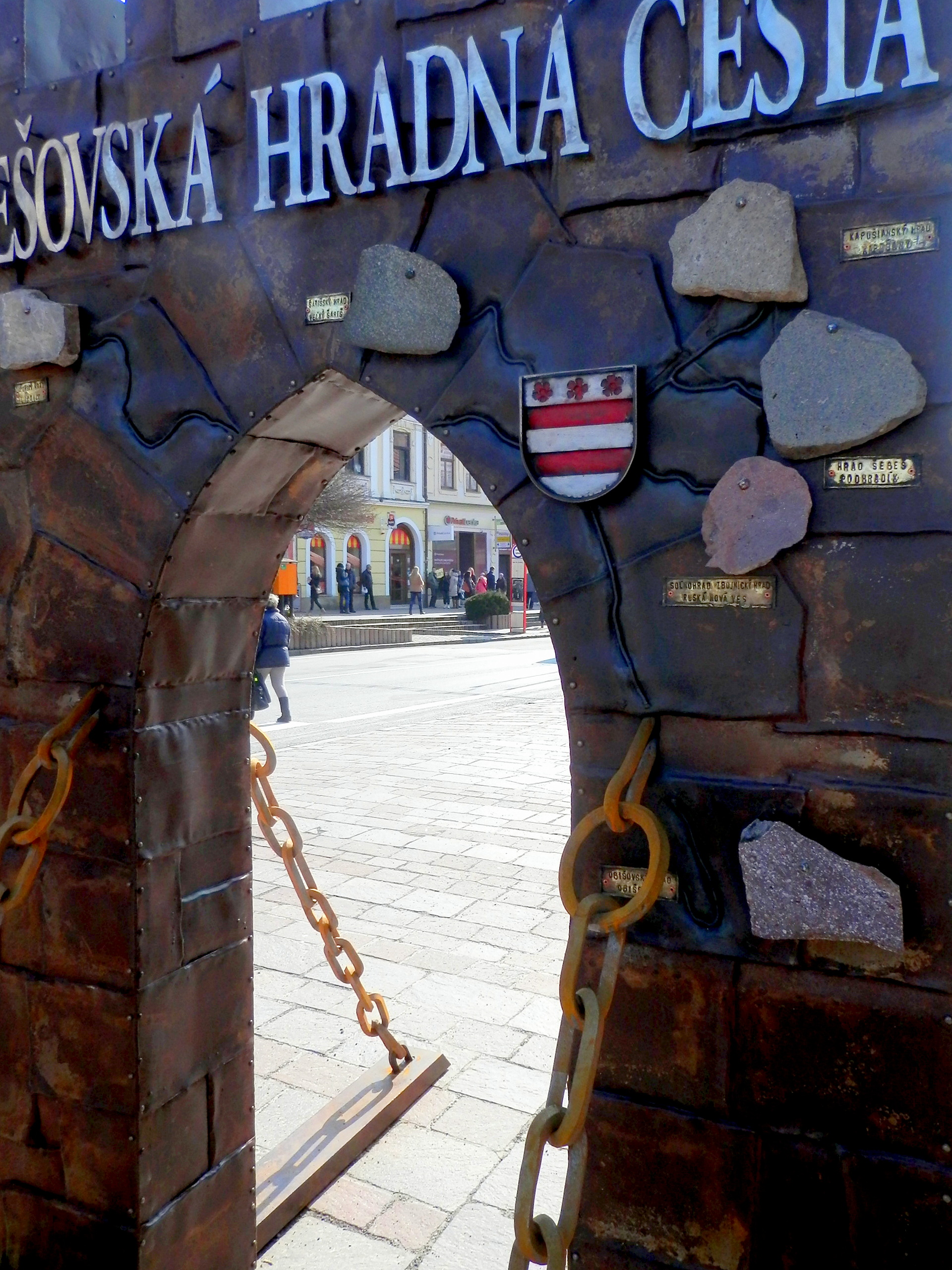 Prešovská hradná cesta. Verejný profilový pútač, k propagácii cestovného ruchu v okolí mesta Prešov. Slávnostná inštalácia 15.3.2016. Hlavná ulica, mesto Prešov.